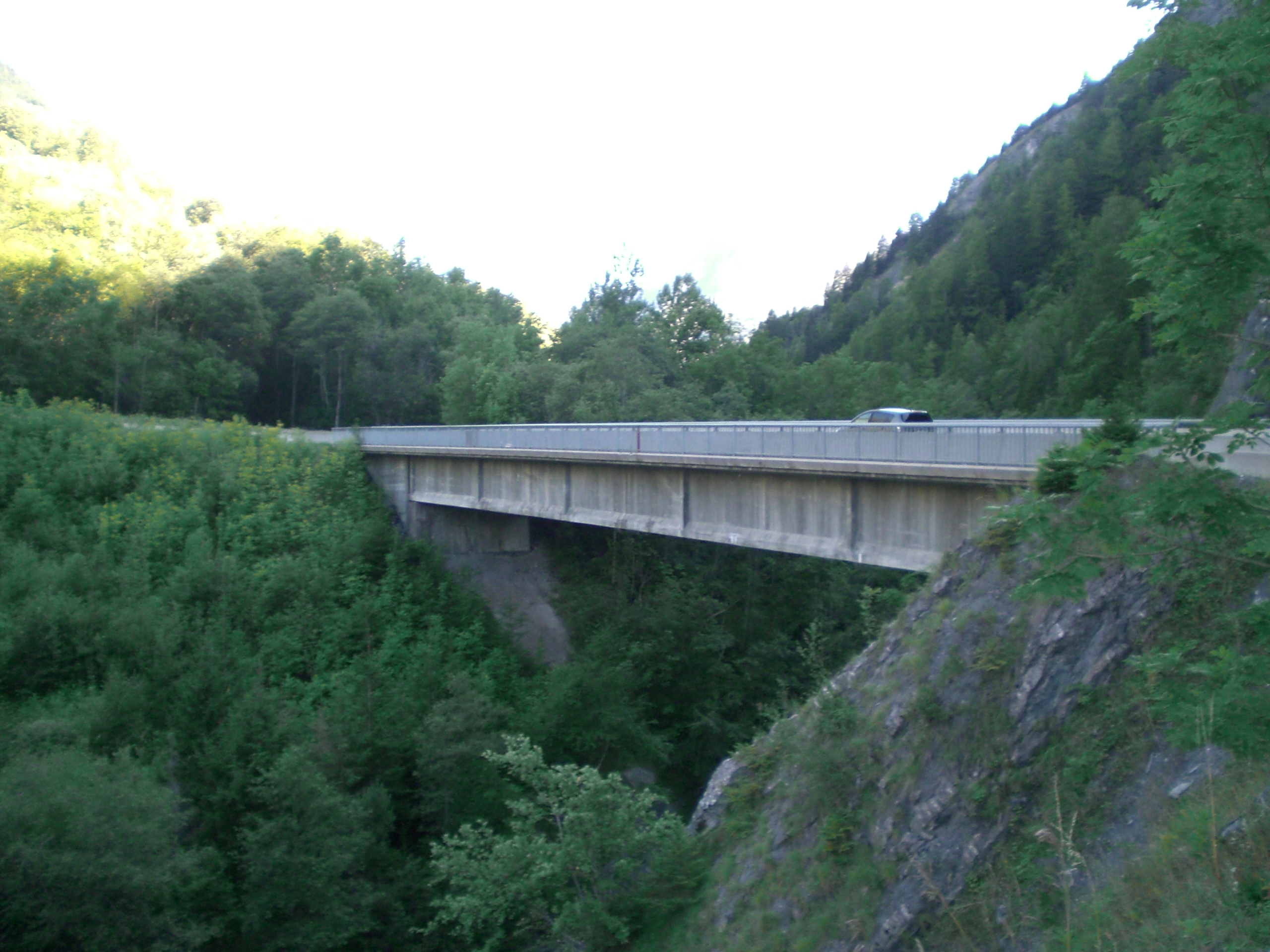 le doron des belleville entre Saint-Jean et Saint-Martin - le pont